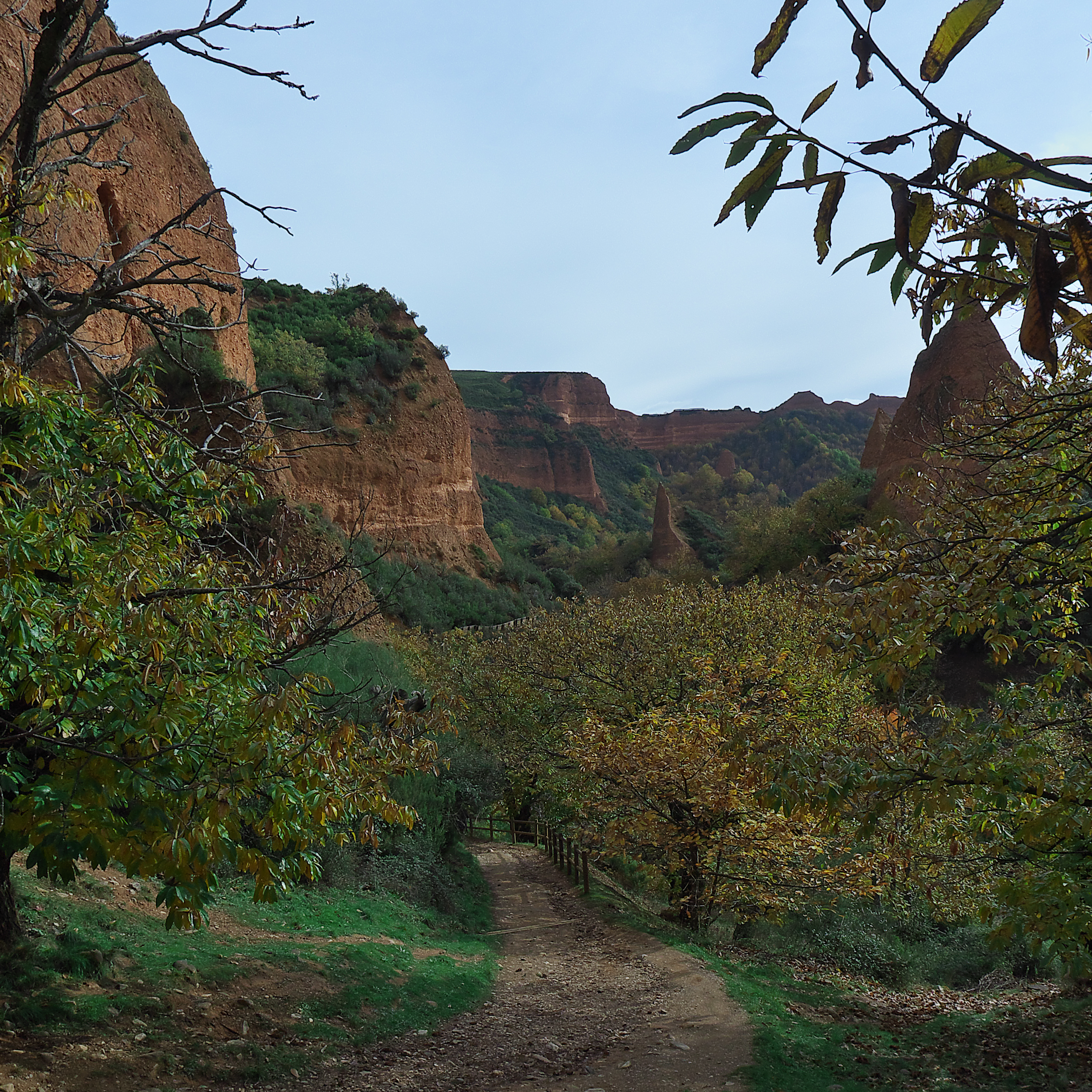 Paisaje de Las Médulas